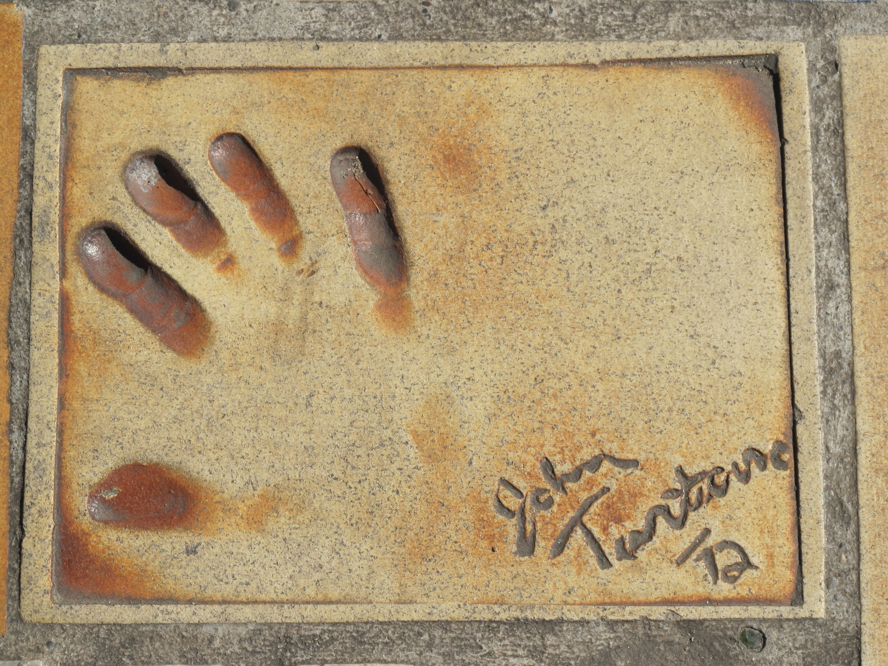 Le impronte di John Turturro a Cannes nella Walk of Fame della Croisette.